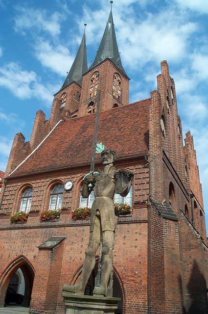 Gerichtlaube in Stendal mit Roland und Marienkirche im Hintergrund